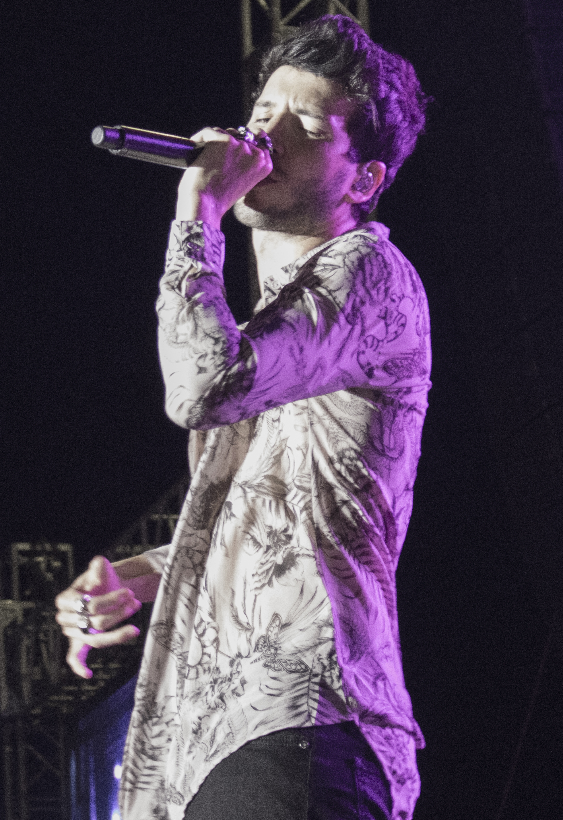 Sebastián Yatra en concierto, en Babahoyo, Ecuador, en 2018.